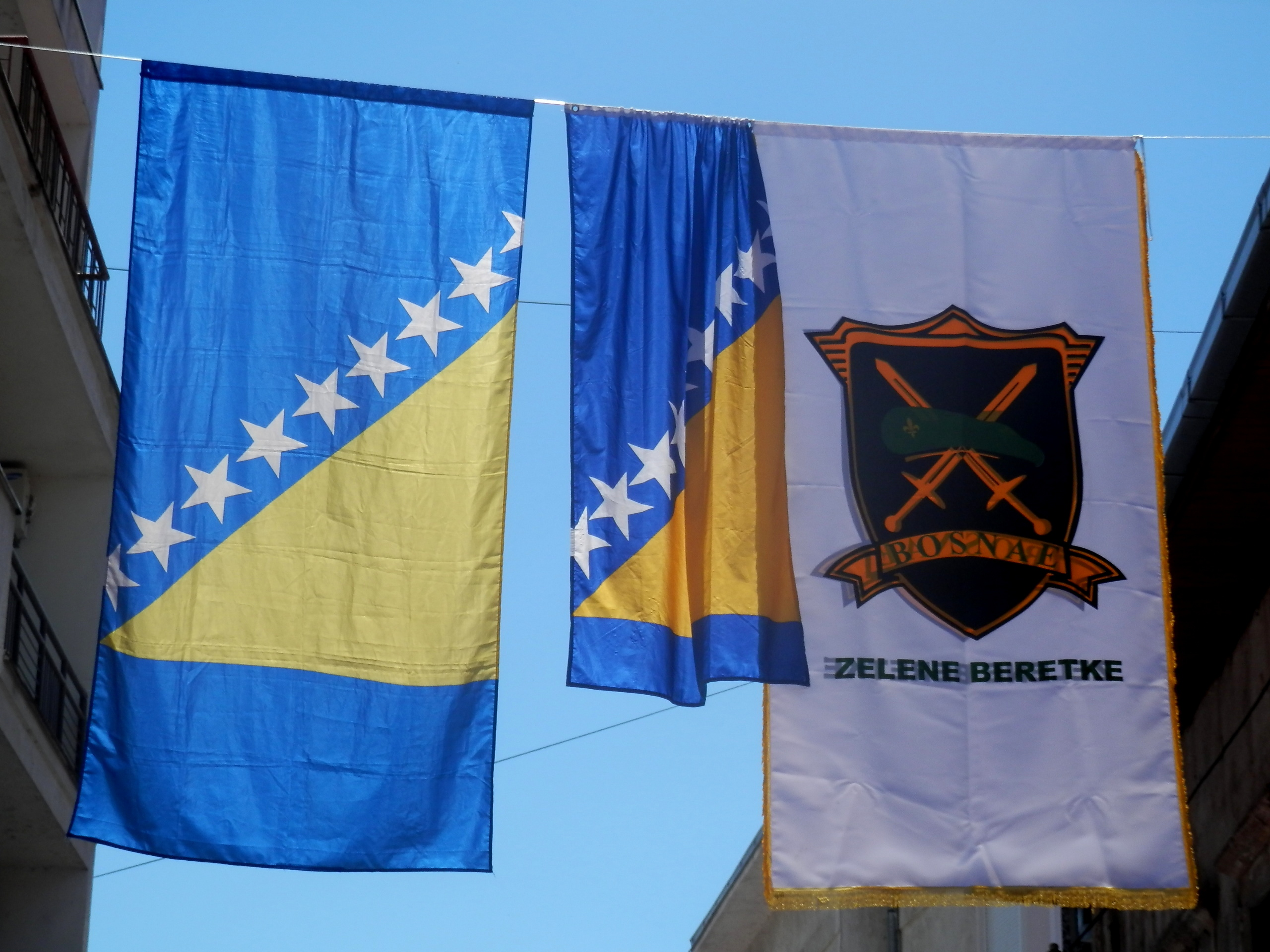 Mesto Mostar.Bosna a Hercegovina.